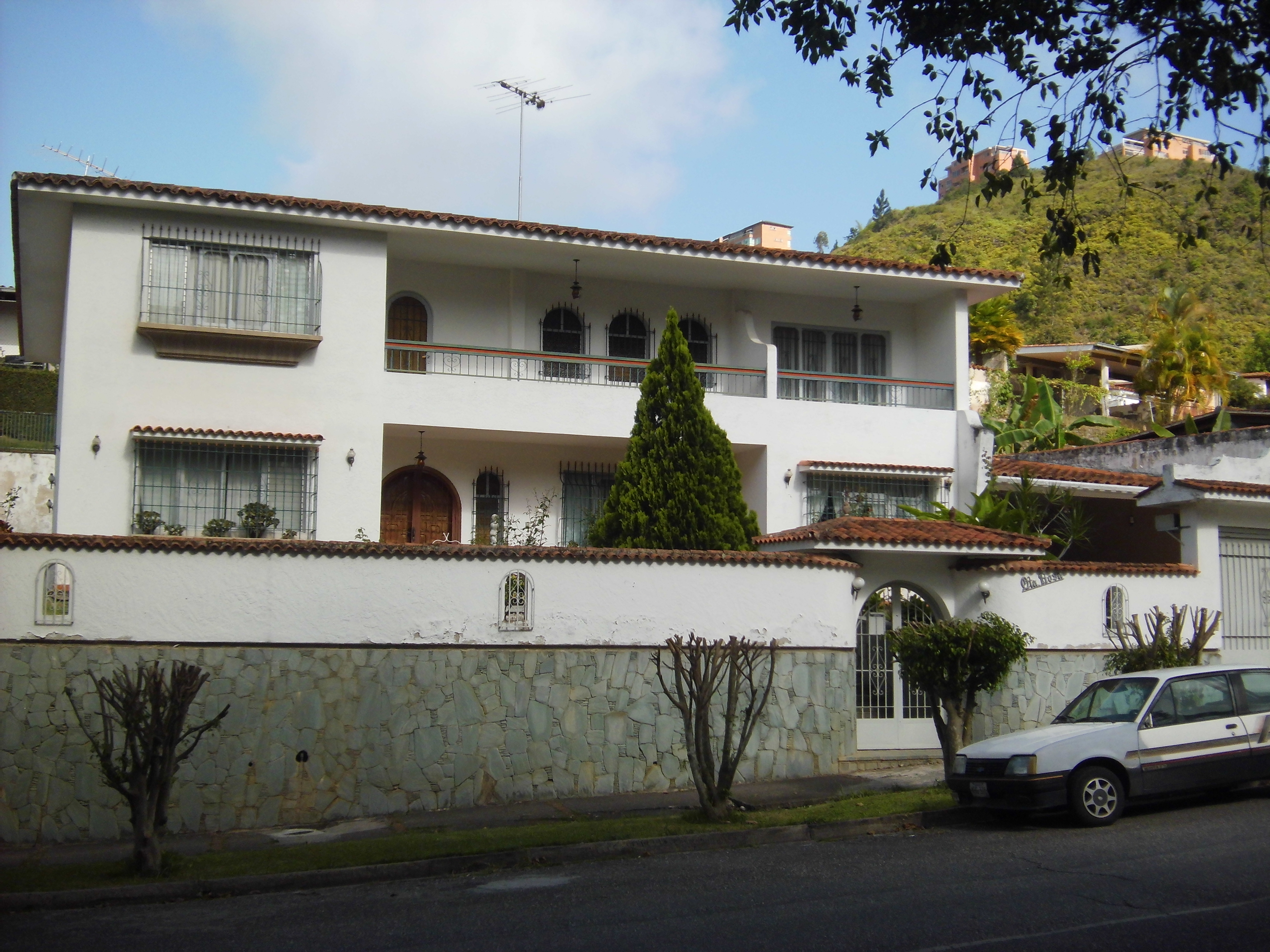 La Boyera casa en la Ave 1, municipio El Hatillo, estado Miranda - Venezuela